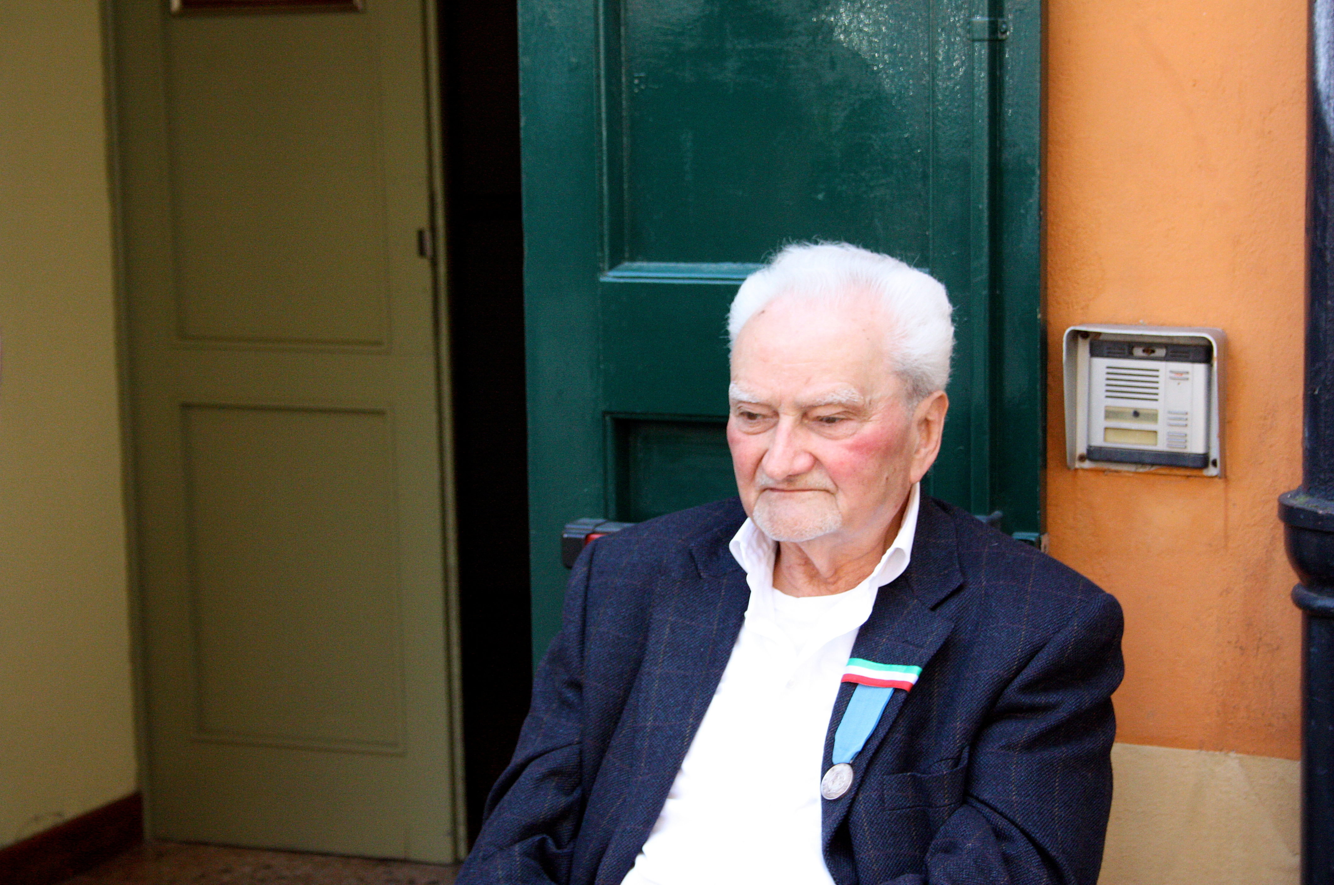 Germano Nicolini, Materiali Resistenti, 25 aprile 2010